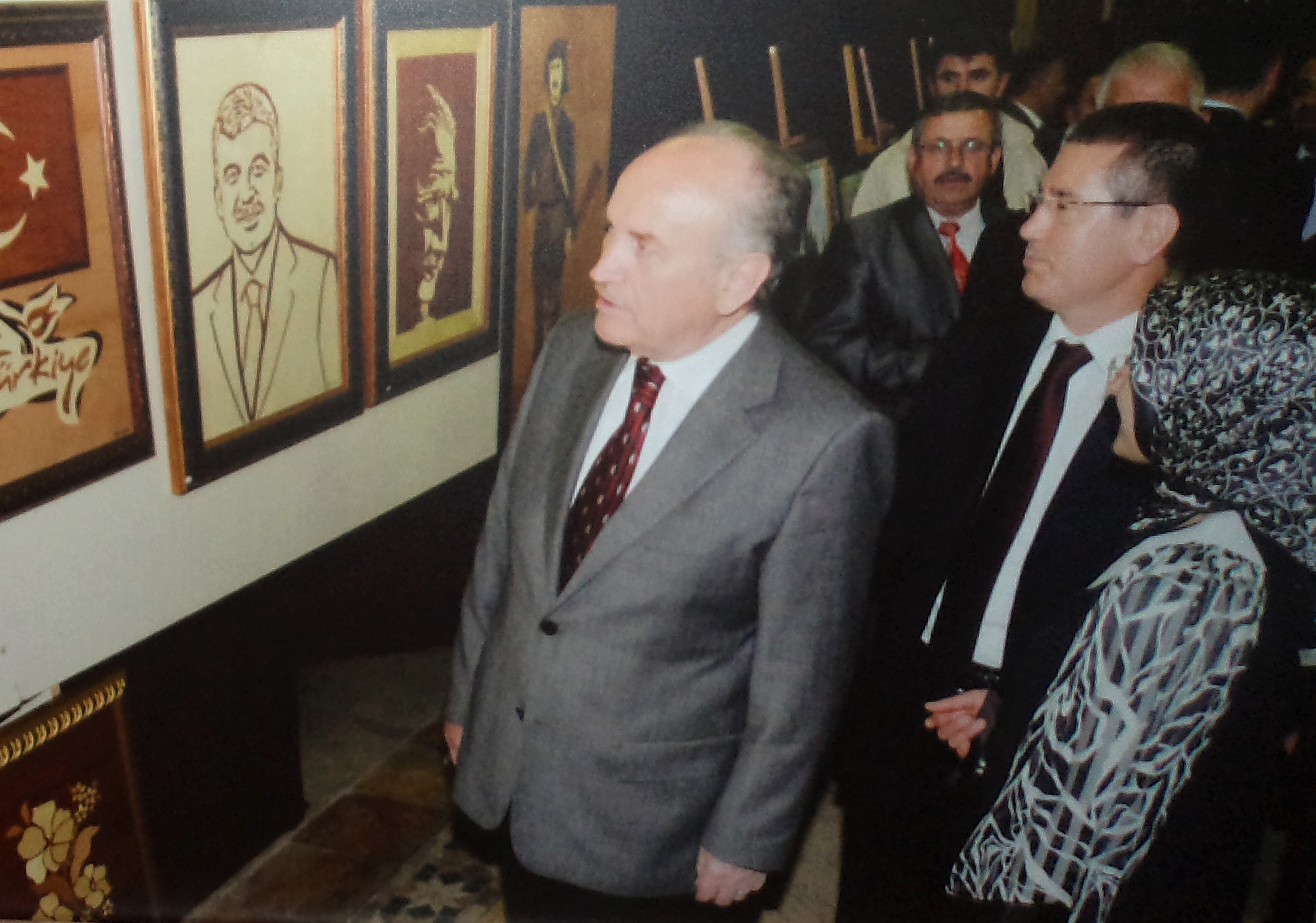 İstanbul Büyükşehir Belediyesi Başkanı Kadir Topbaş, Nurettin Canikli ile sergide gezinirken.